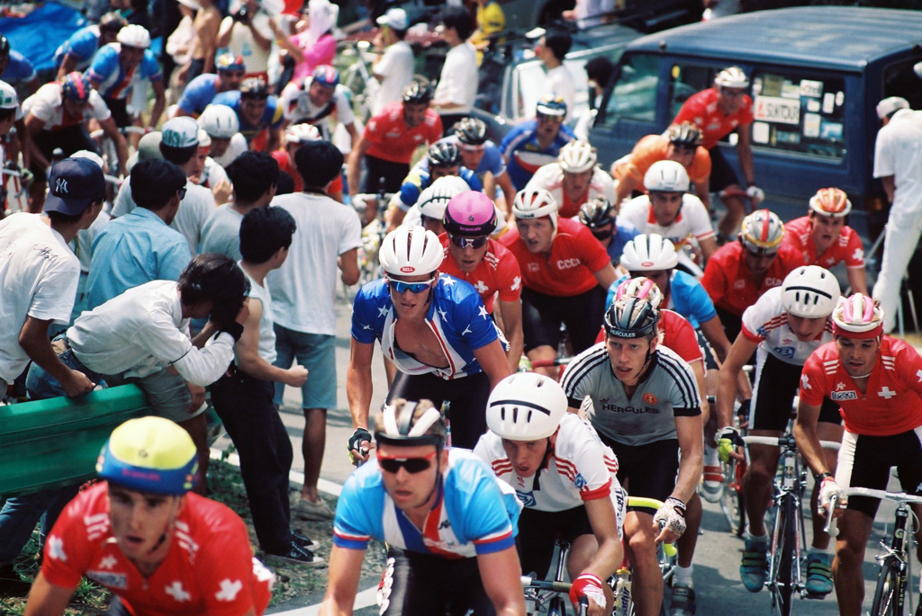 Lance Armstrong et Laurent Dufaux, lors de la course en ligne amateur des championnats du monde de cyclisme de 1990.